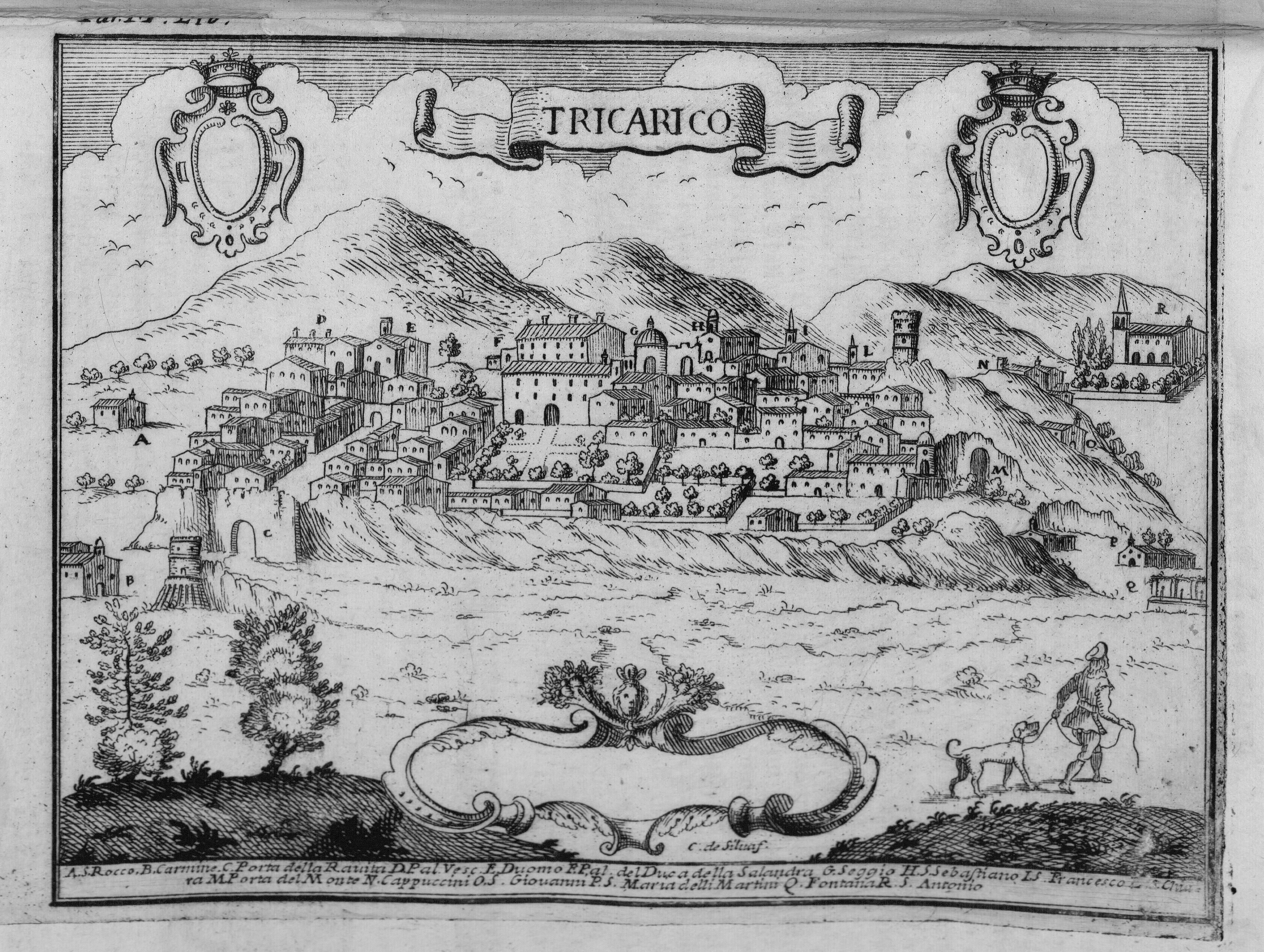 Autor: Pacichelli, Giovanni Battista, 1641-1702 Descripción bibliográfica: Il regno di Napoli in prospettiva : diviso in dodeci provincie, in cui si descrivono la sua Metropoli Fidelissima città di Napoli ... Opera postuma divisa in tre parti / dell'abatte Gio. Battista Pacichelli ; Parte prima [-terza] ... Del regno di Napoli in prospettiva / dell'abate Pacichelli. Parte prima. - In Napoli : nella Stamperia di Michele Luigi Mutio, 1703. - v. : principalmente il.; 4º . - Inic. adorn. y frisos dec. - Grab. calc. y h. pleg. grab. calc. de mapas de Cassianus de Silva. Ilustrador: Cassiano De Silva, Francesco, il. Impresor: Muzio, Michele Luigi, imp. Lugar de impresión: Italia. Nápoles Localización: Vea la ilustración en su contexto